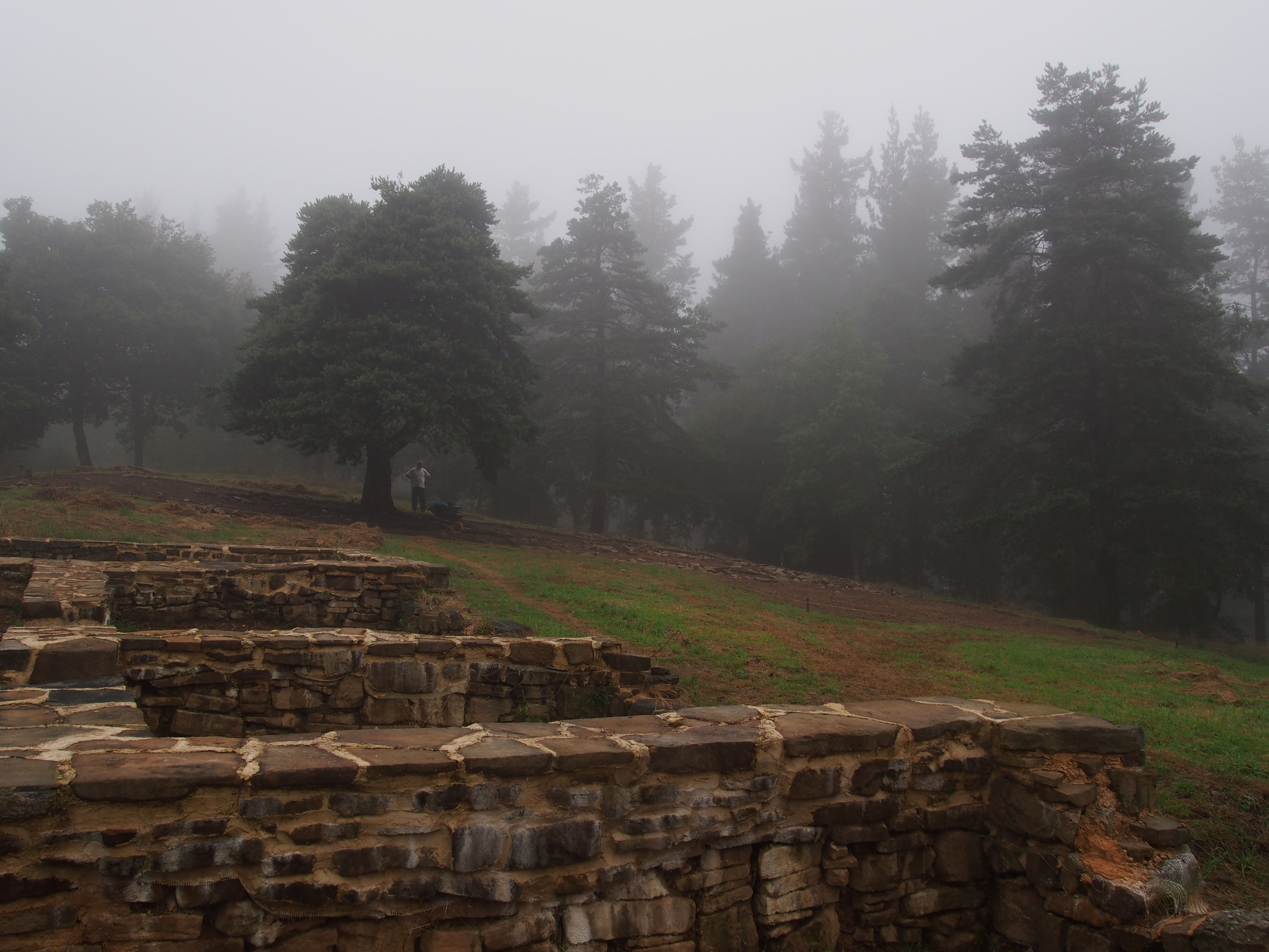 Elexazarreko eraikin konplexuaren hormak